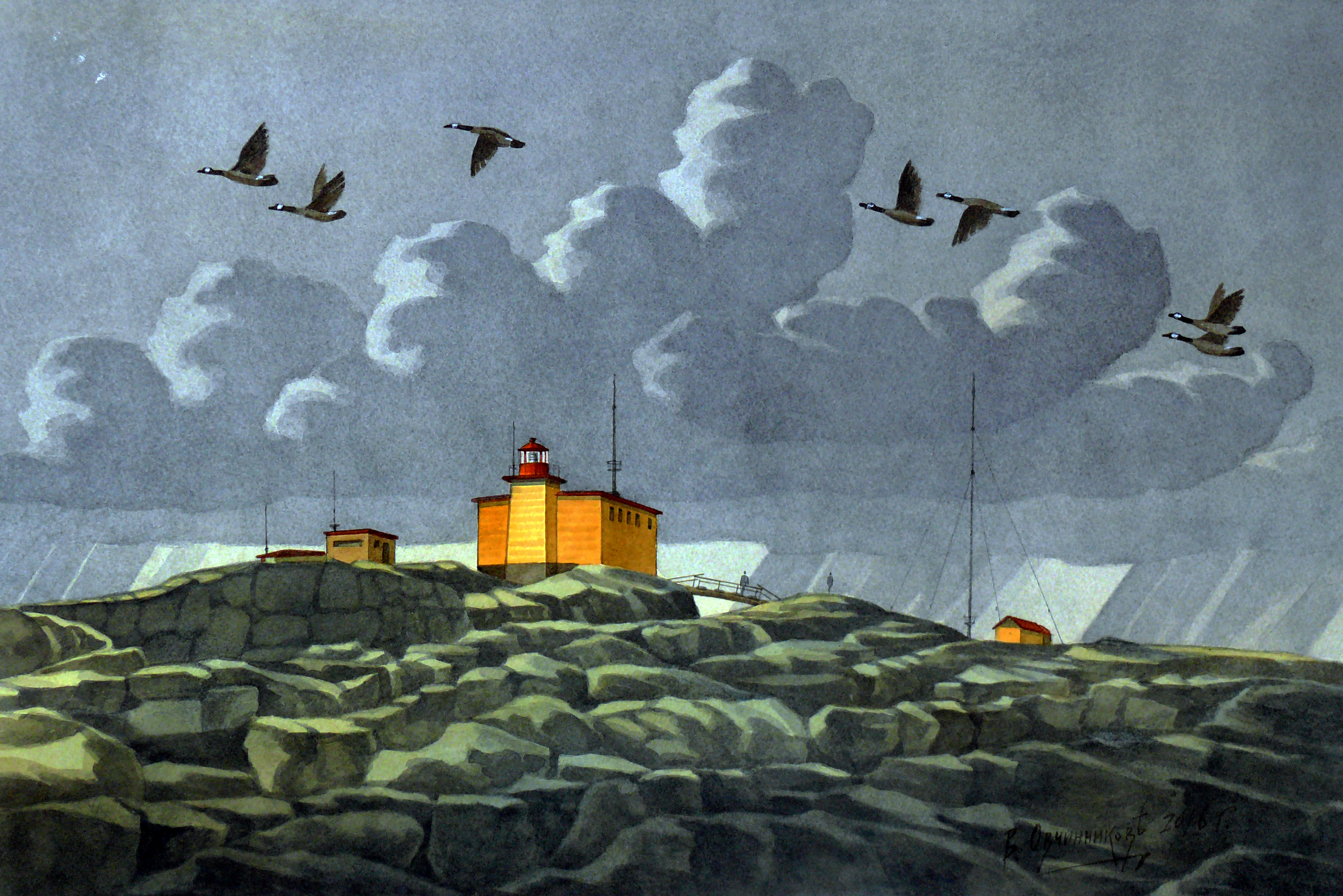 Картина «Маяк Териберский» Вячеслава Ивановича Овчинникова, год